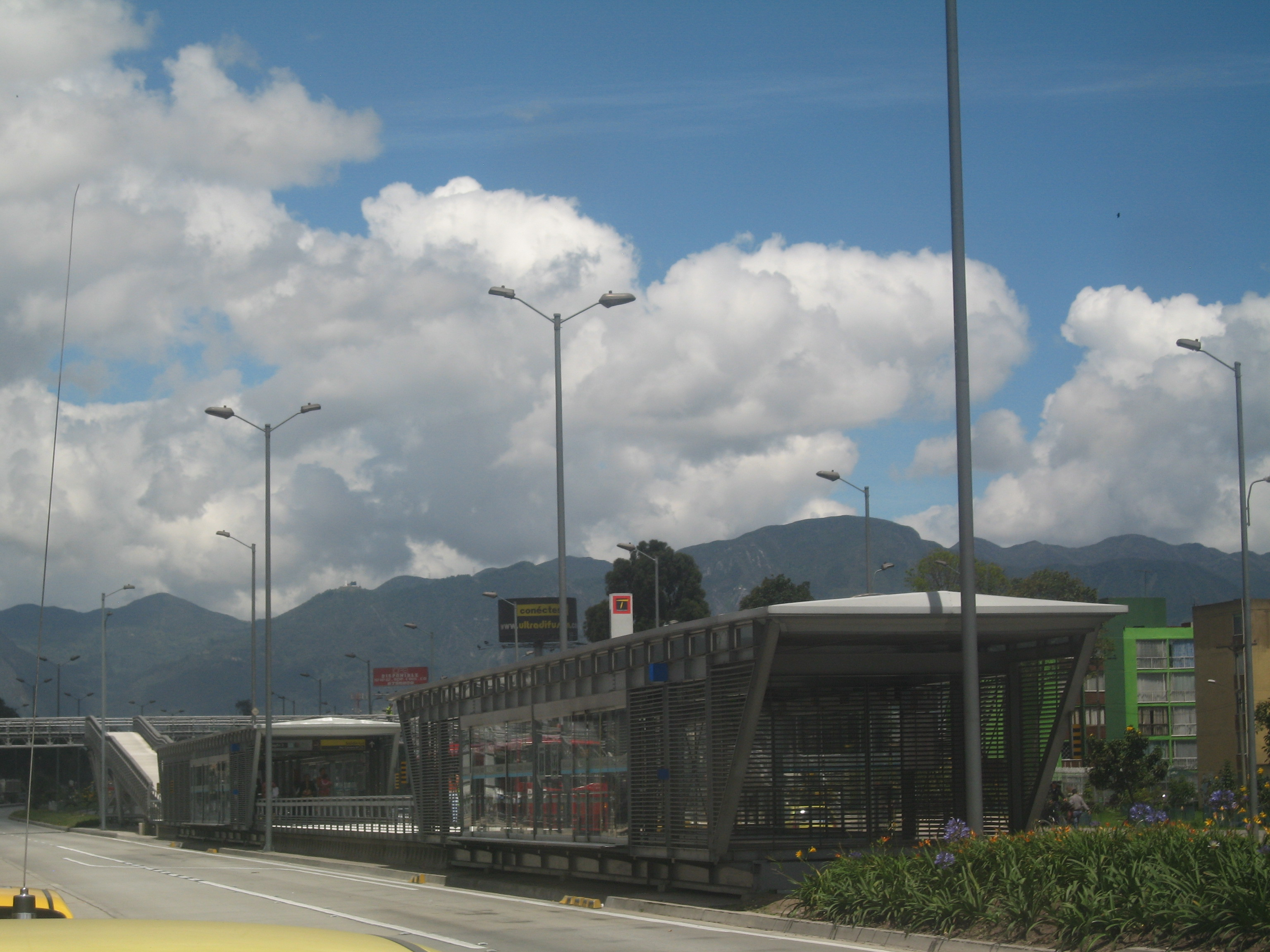 Estacion Madelena perteneciente al sistema de transporte masivo Transmilenio